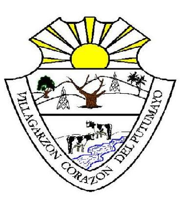 Villagarzon putumayo escudo